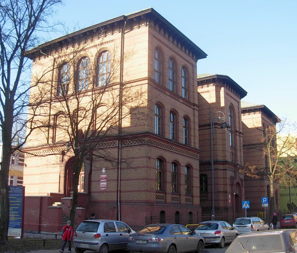 Zespół Szkół Gastronomicznych w Bydgoszczy